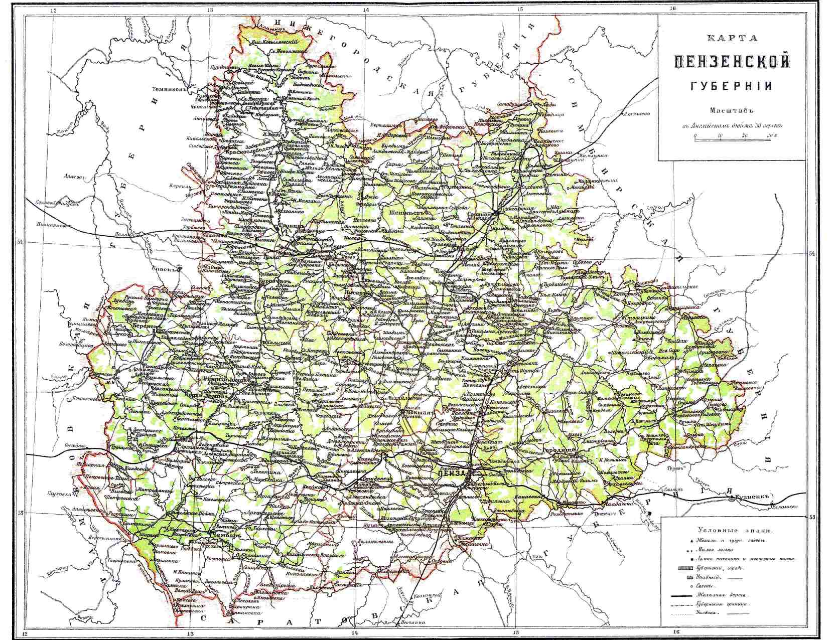 Карта Пензенской губернии, начало 20 века